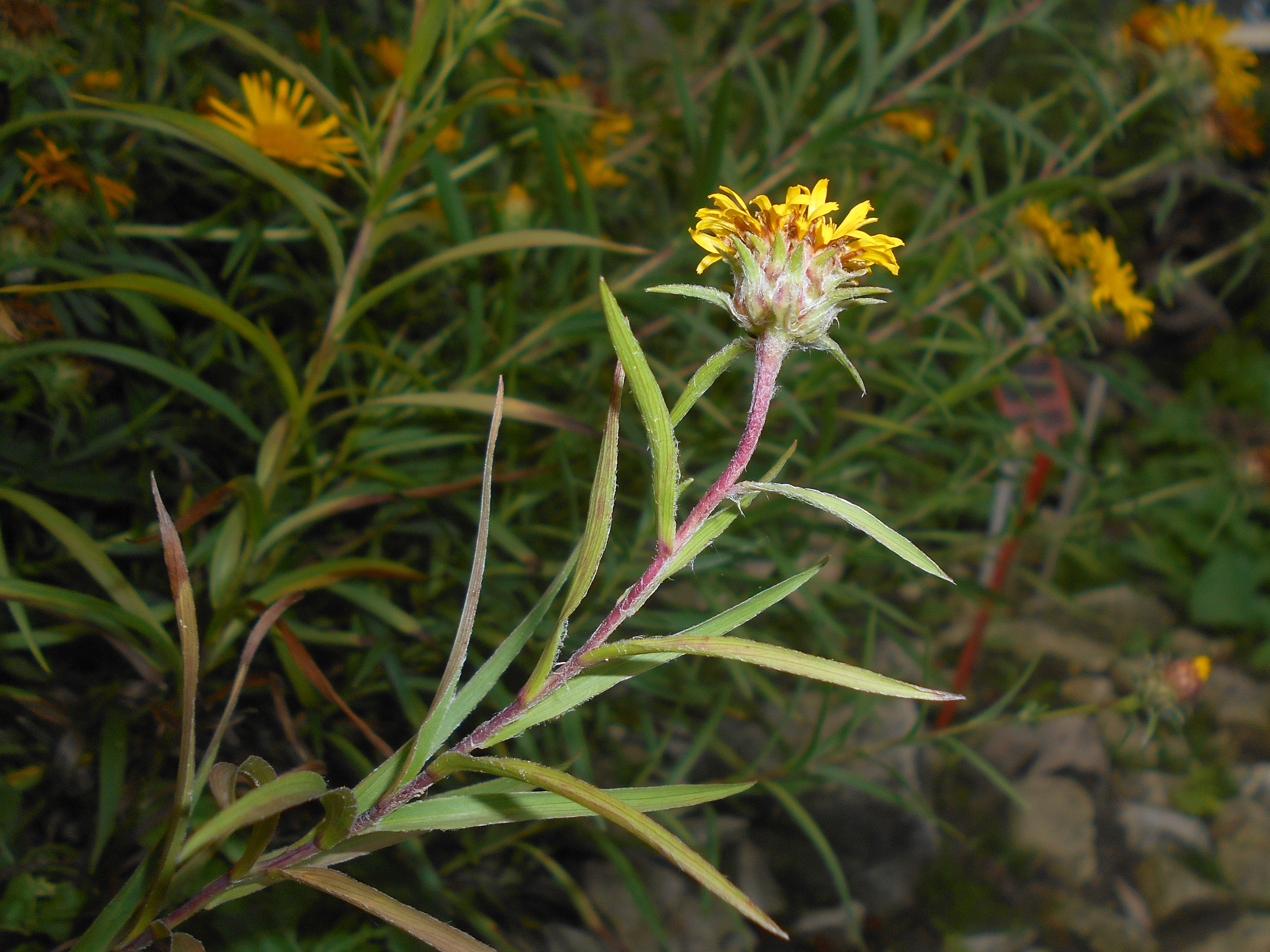 Oman wąskolistny (Inula ensifolia), Ogród Botaniczny UMCS w Lublinie.